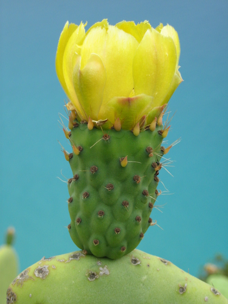 Flore di Opuntia ficus-indica en el sur de Italia